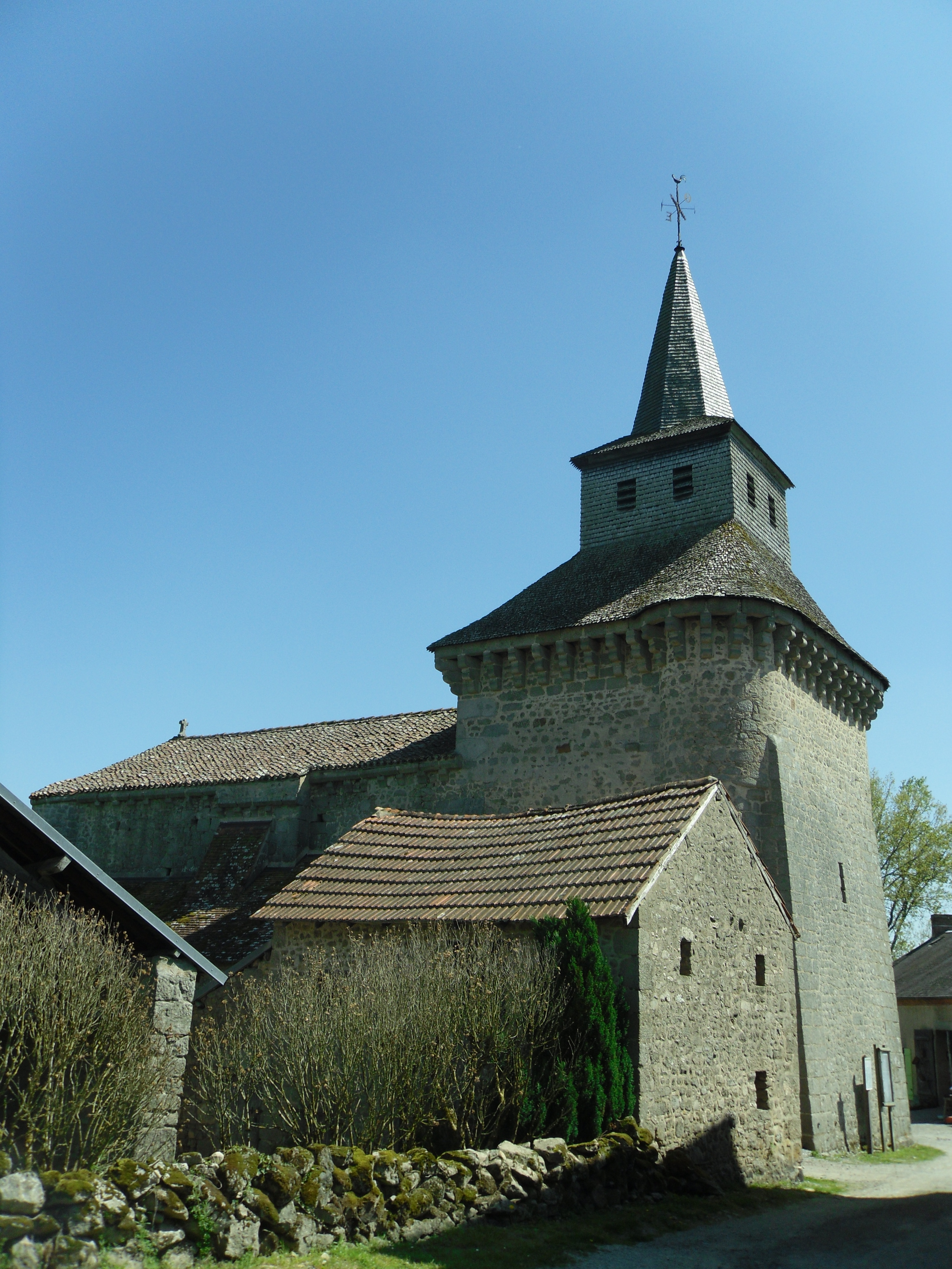 Eglise XIIIe siècle